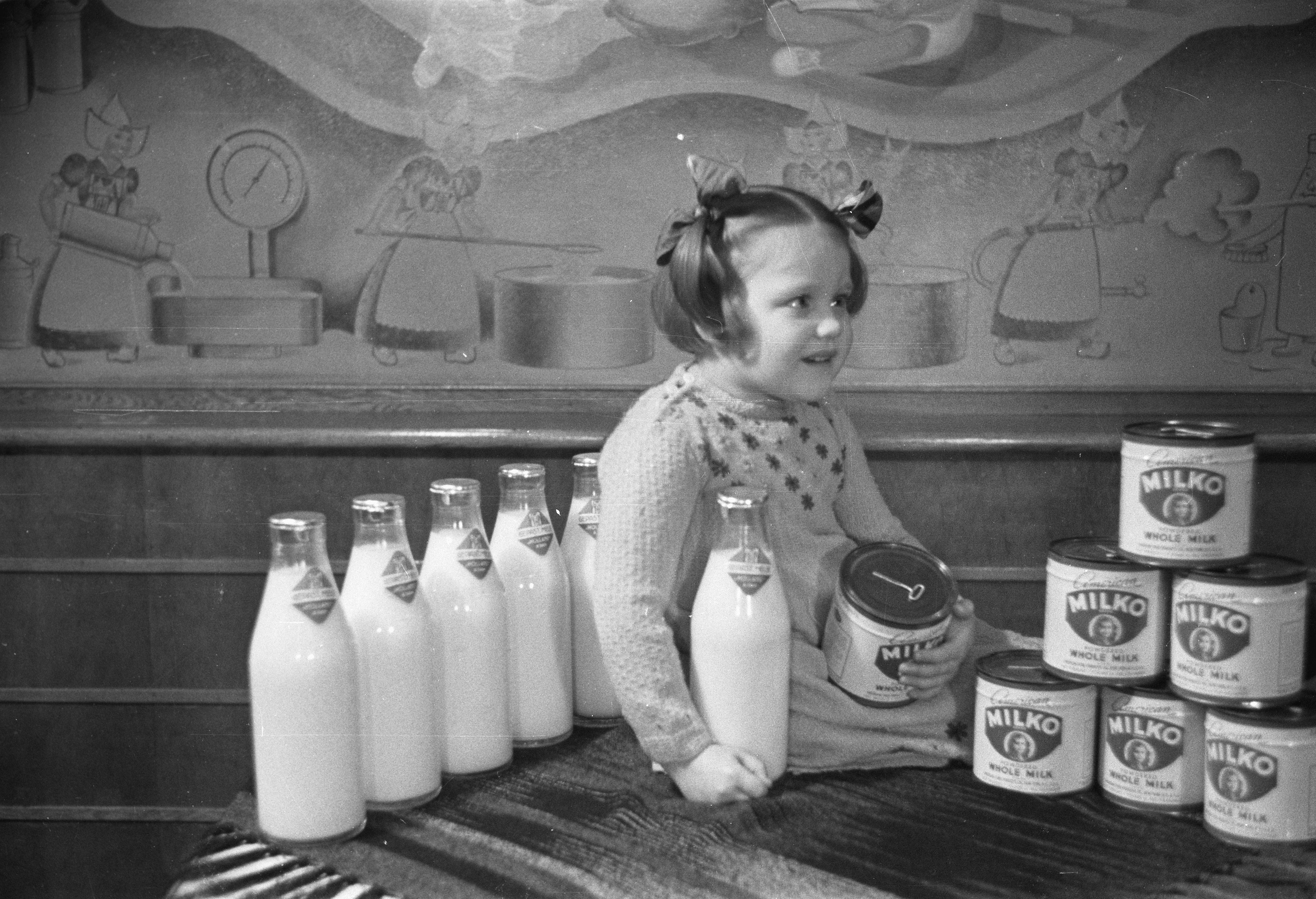 Collectie / Archief : Fotocollectie Anefo Reportage / Serie : [ onbekend ] Beschrijving : Melkfabriek Holland Datum : 18 februari 1946 Locatie : Holland Trefwoorden : melkfabriek Fotograaf : Sagers, Harry / Anefo Auteursrechthebbende : Nationaal Archief Materiaalsoort : Negatief (zwart/wit) Nummer archiefinventaris : bekijk toegang 2.24.01.05 Bestanddeelnummer : 901-4723